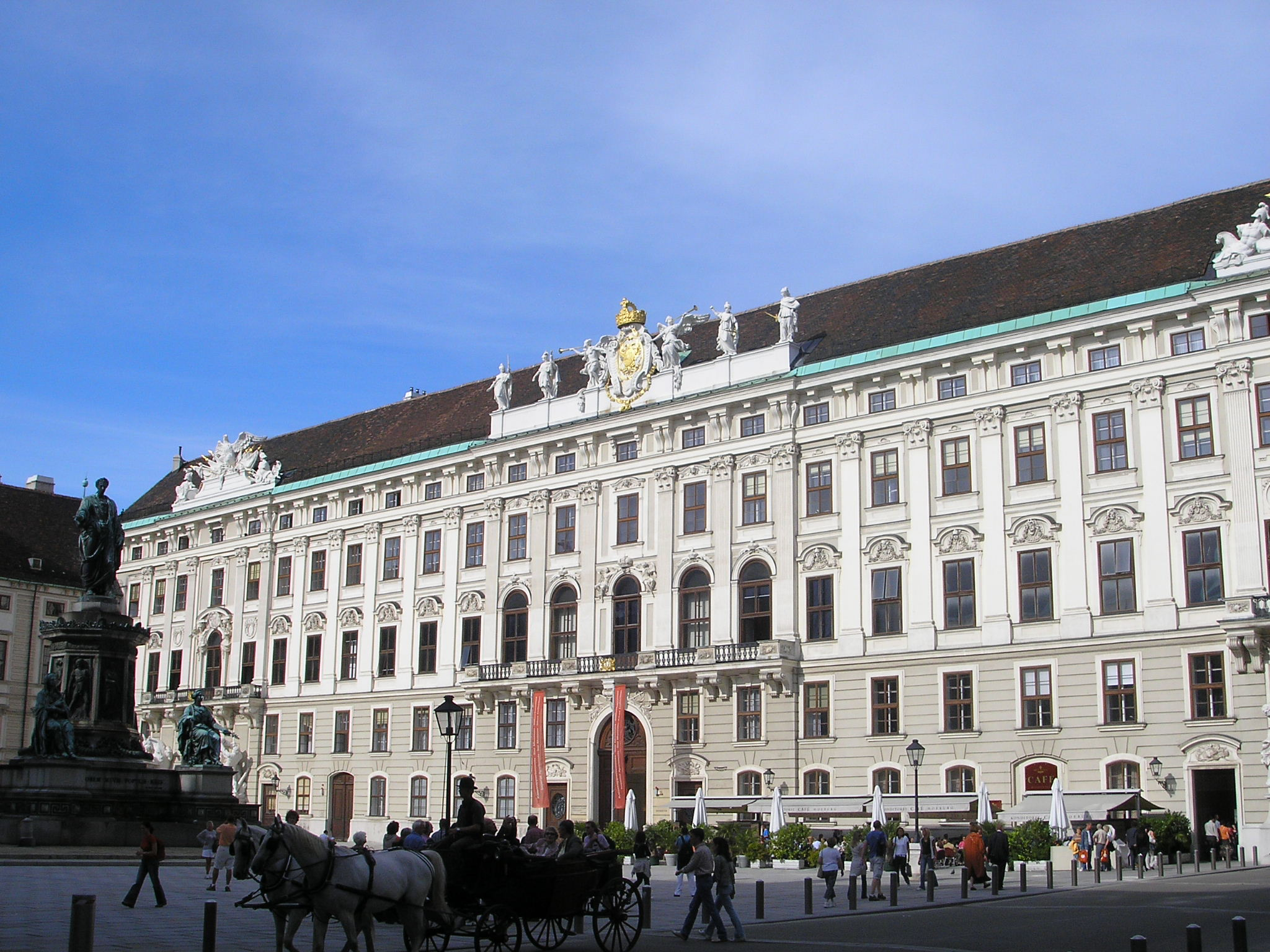 The Reichskanzleitrakt of the Hofburg Imperial Palace in Vienna.